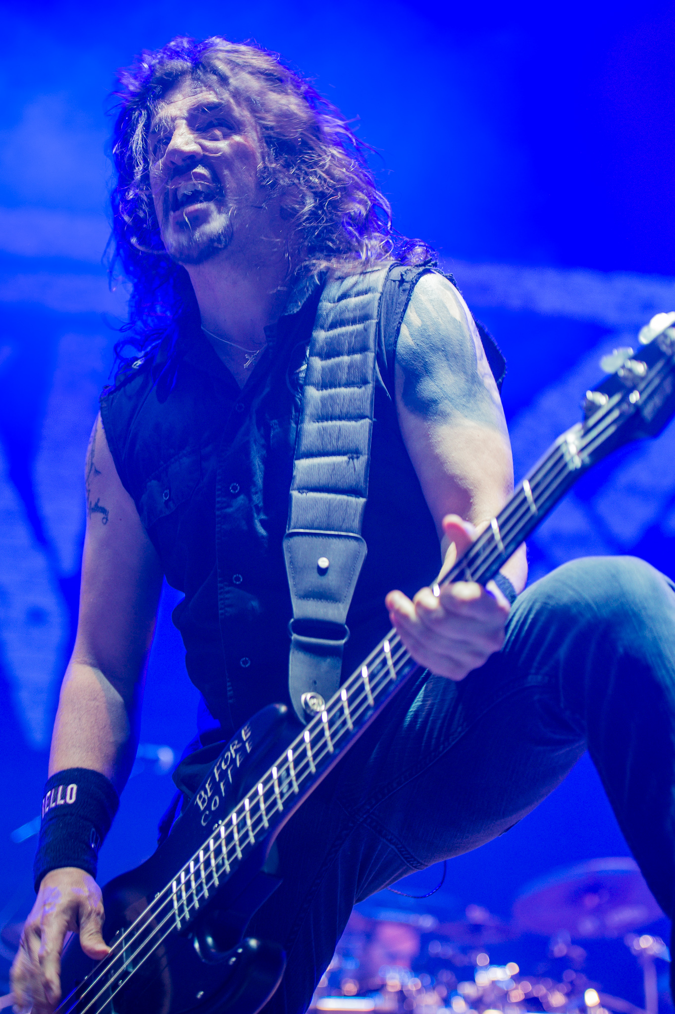 ARGO-Konzerte,Anthrax,Arena Nürnberger Versicherungen,Clubstage,Frank Bello,Konzert,Livekonzert,Livemusik,Musik,RiP,Rock im Park 2014